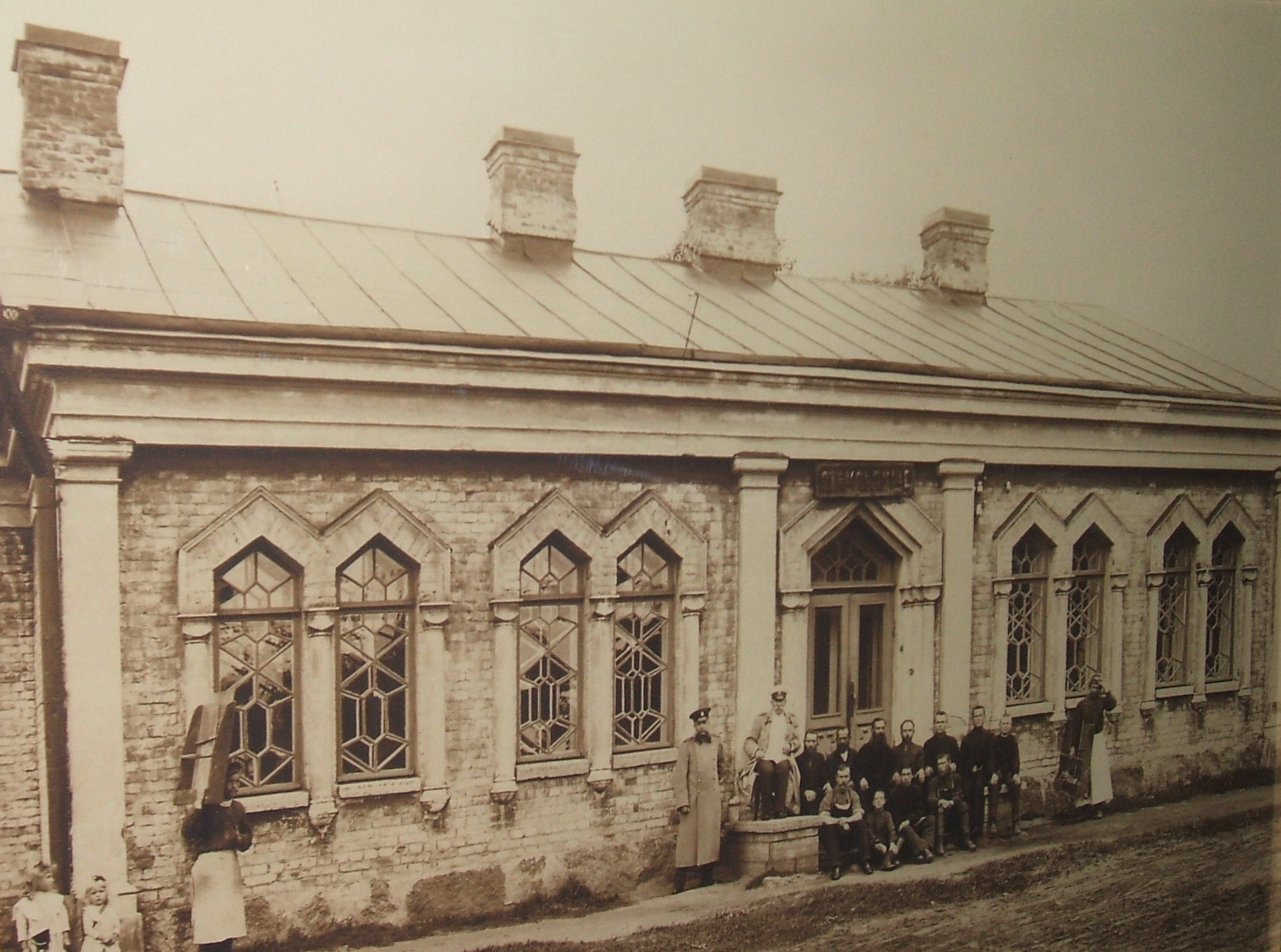 Сестрорецк СПб. Оружейный завод. Здание стрельбища.